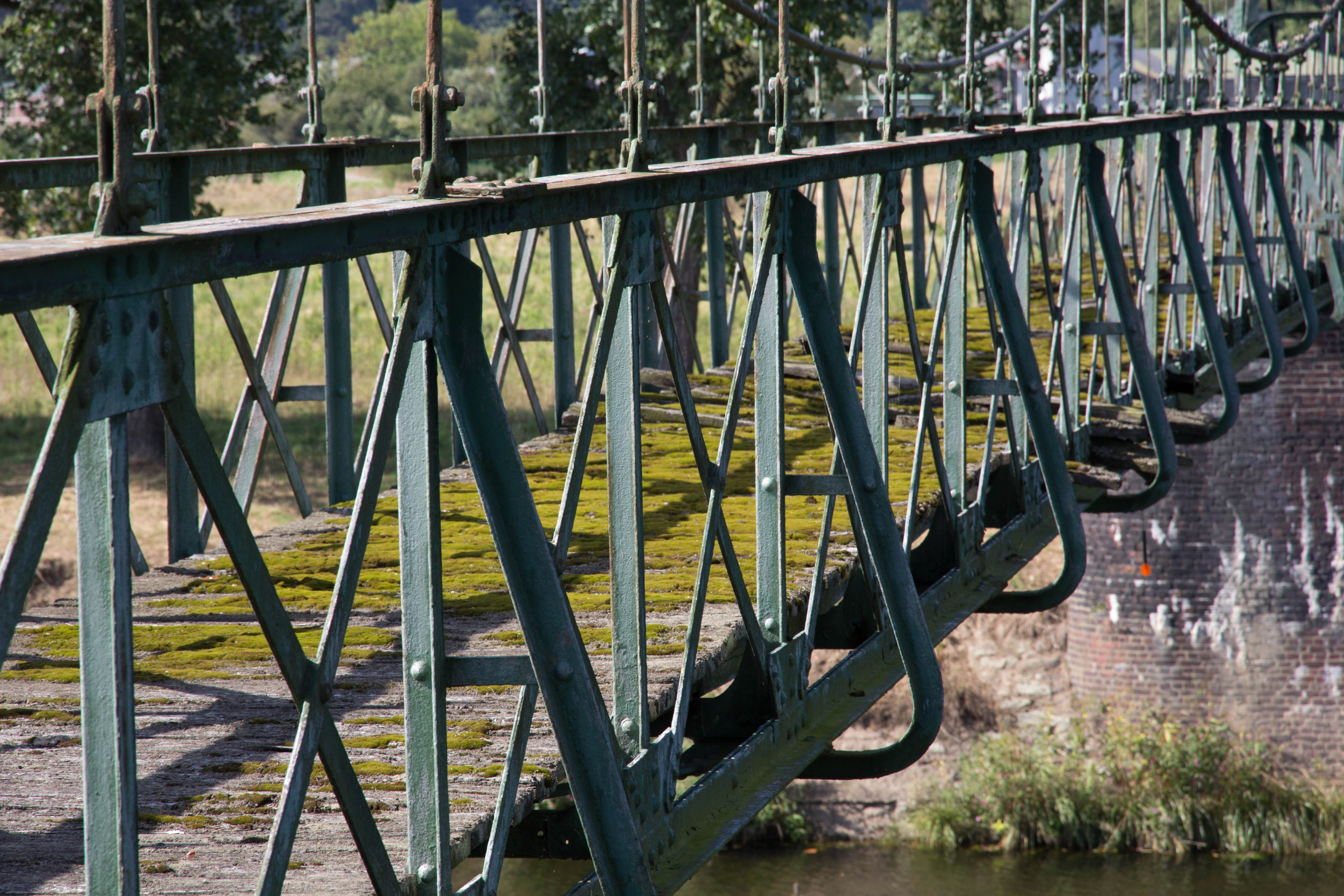 An den Holzdielen nagt der Zahn der Zeit...This is a photograph of an architectural monument.